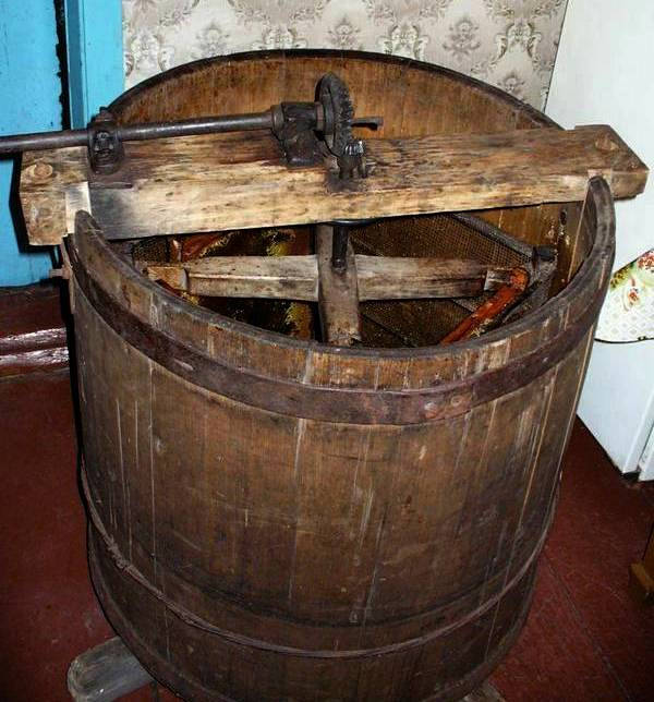 Медогонка деревянная. Середна 20 века.